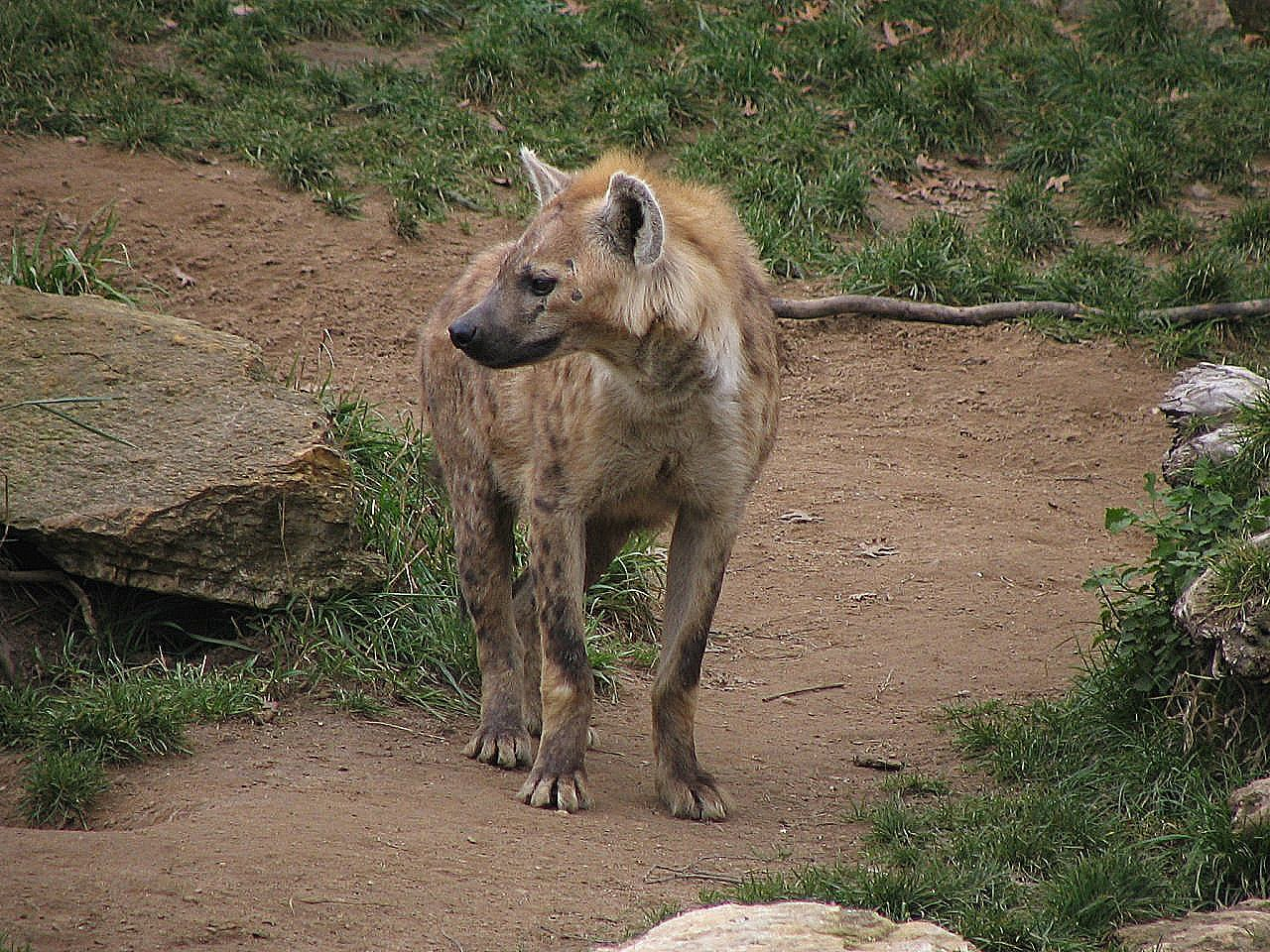 Tüpfelhyäne (Crocuta crocuta), Zoo Leipzig / Germany